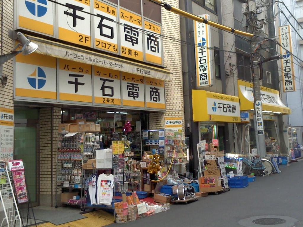 千石電商秋葉原2号店・3号店・本店(2014/11/17撮影)